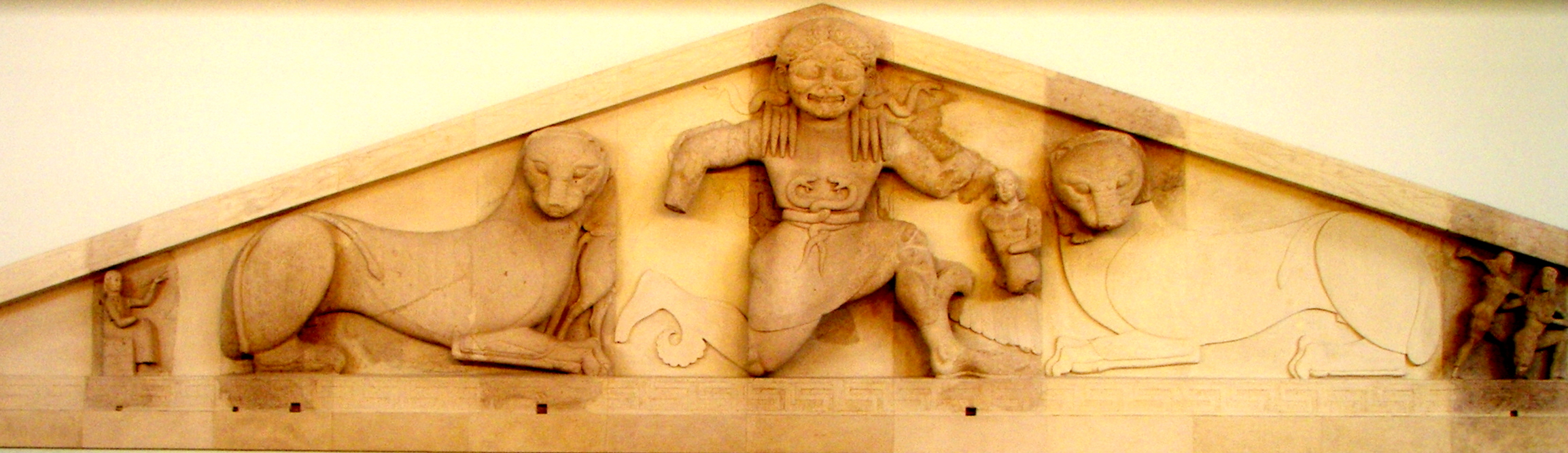 Una versión arcaica de Medusa en el frontón de un templo de Corfú. Museo arqueológico de Corfú.